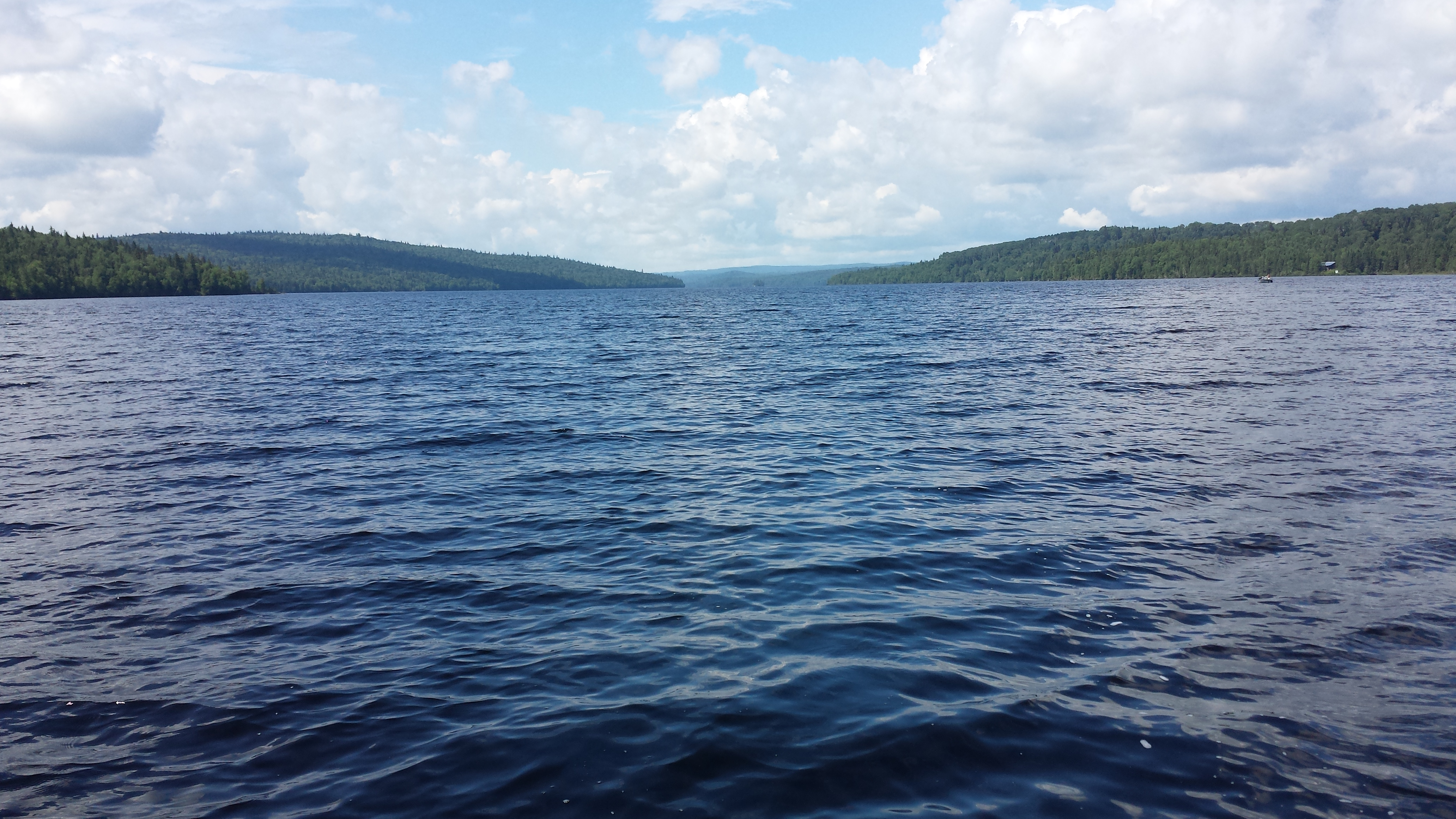 Réservoir Blanc (Mauricie, Québec, Canada): photo prise en juillet 2015 à la hauteur de l'embouchure de la Petite rivière Pierriche.